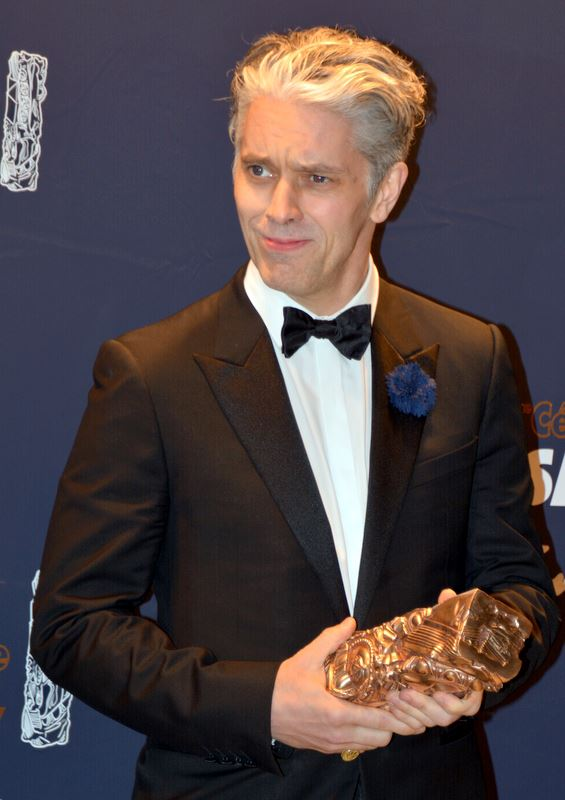 James Thierrée à la cérémonie des César